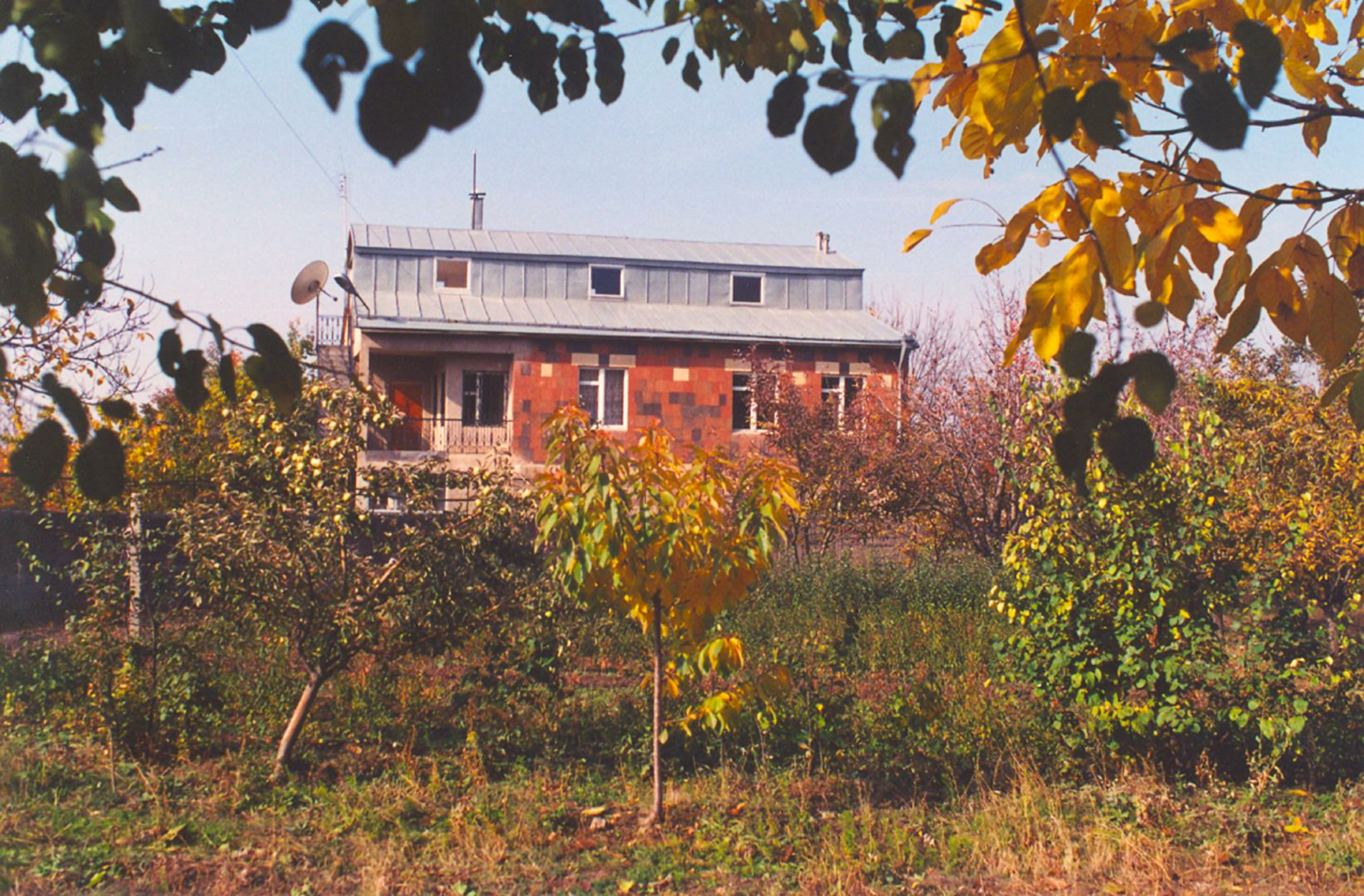 Աժդահակ հյուրատունը Գեղաշեն գյուղում